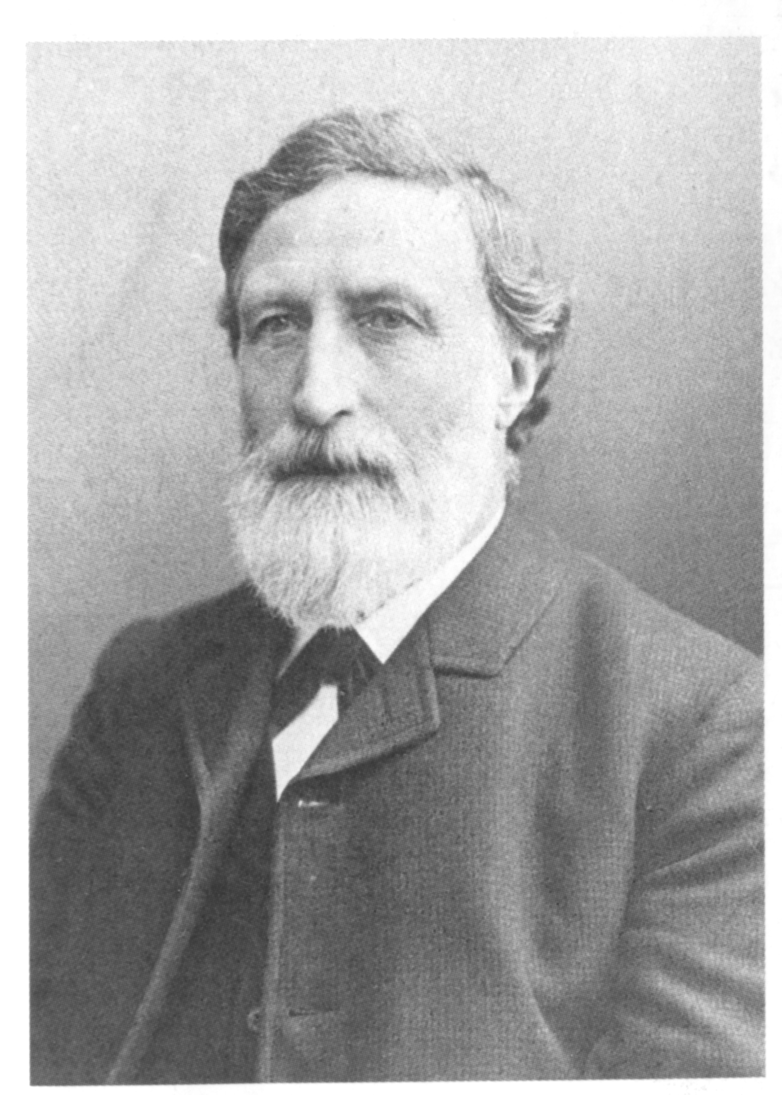 Carl Curtius (1841-1922), Porträtfoto